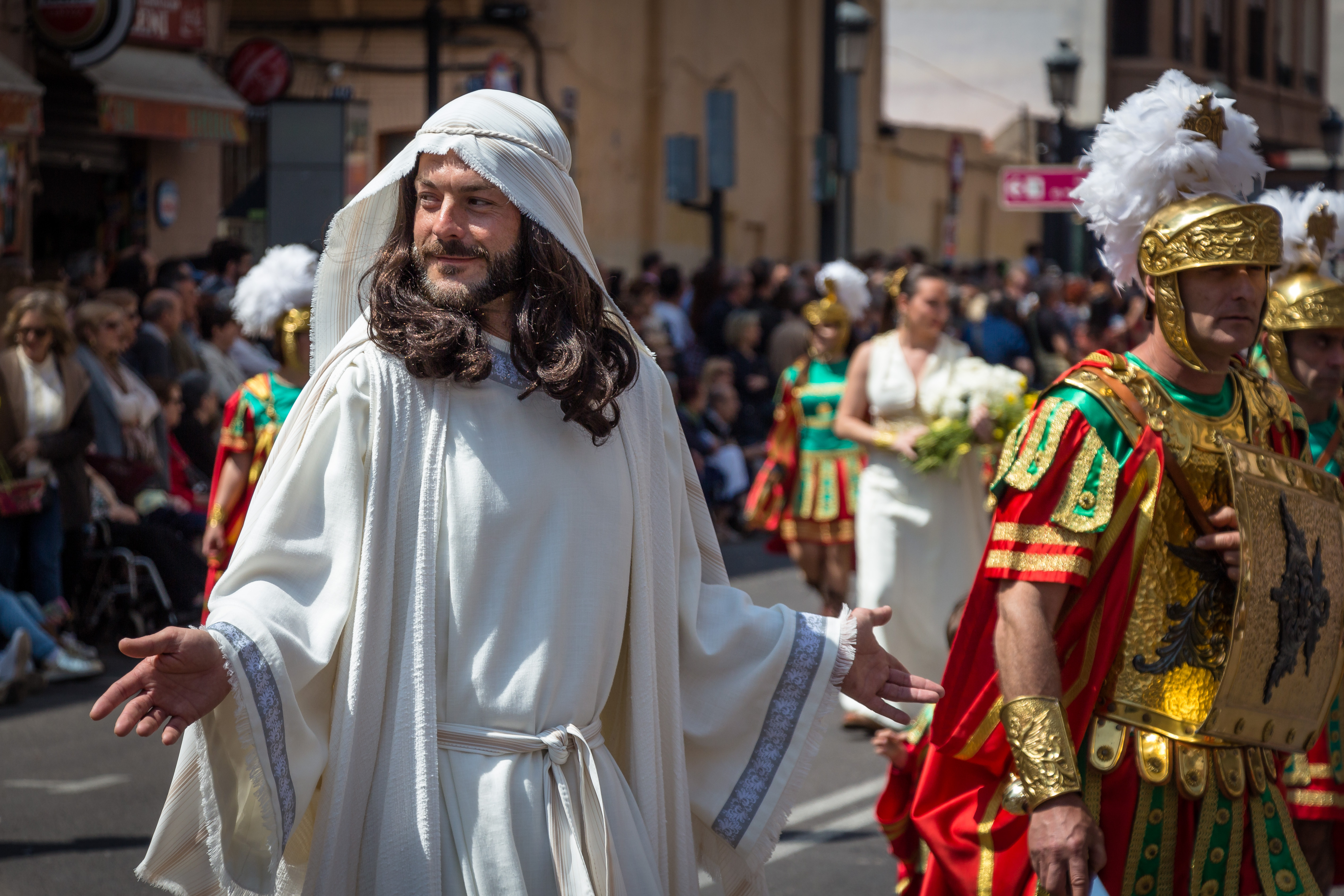 El Desfile de Resurrección es un acto único entre las celebraciones de Semana Santa, pues lo domina la alegría y el colorido. Para celebrar la Resurección de Cristo, los personajes bíblicos sustituyen sus objetos alegóricos por flores que lanzan al público. This is a photography of a Folklore festival in Spain (Wikidata id Q9075846).